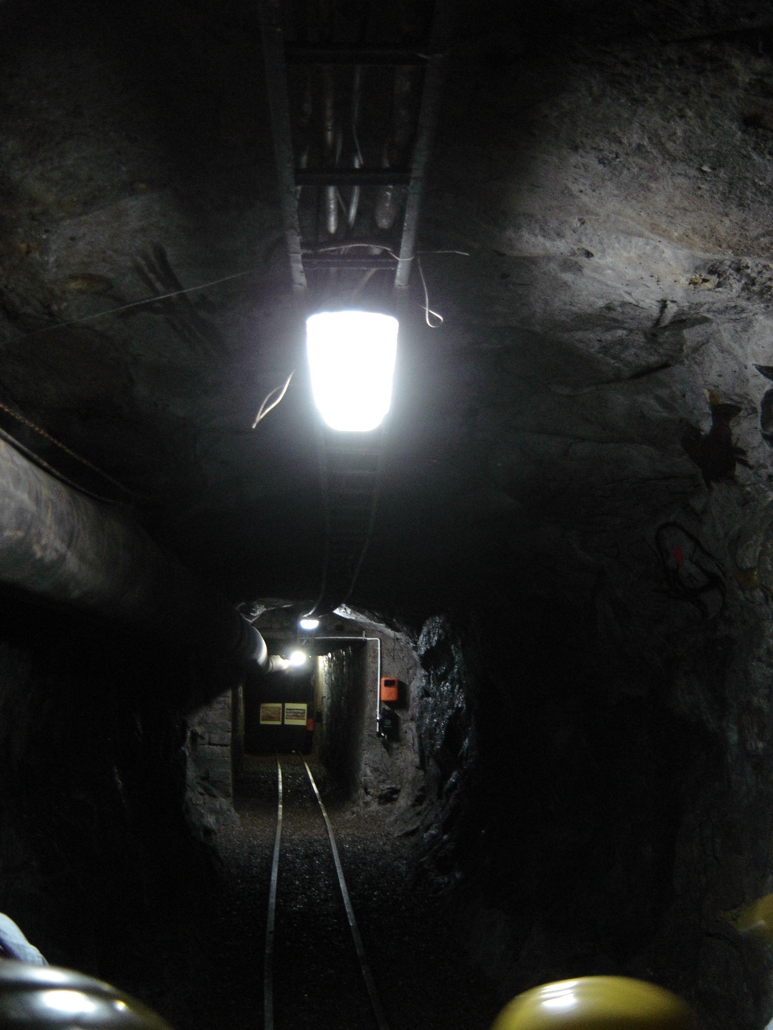 Początkowy odcinek "Lisiej sztolni".